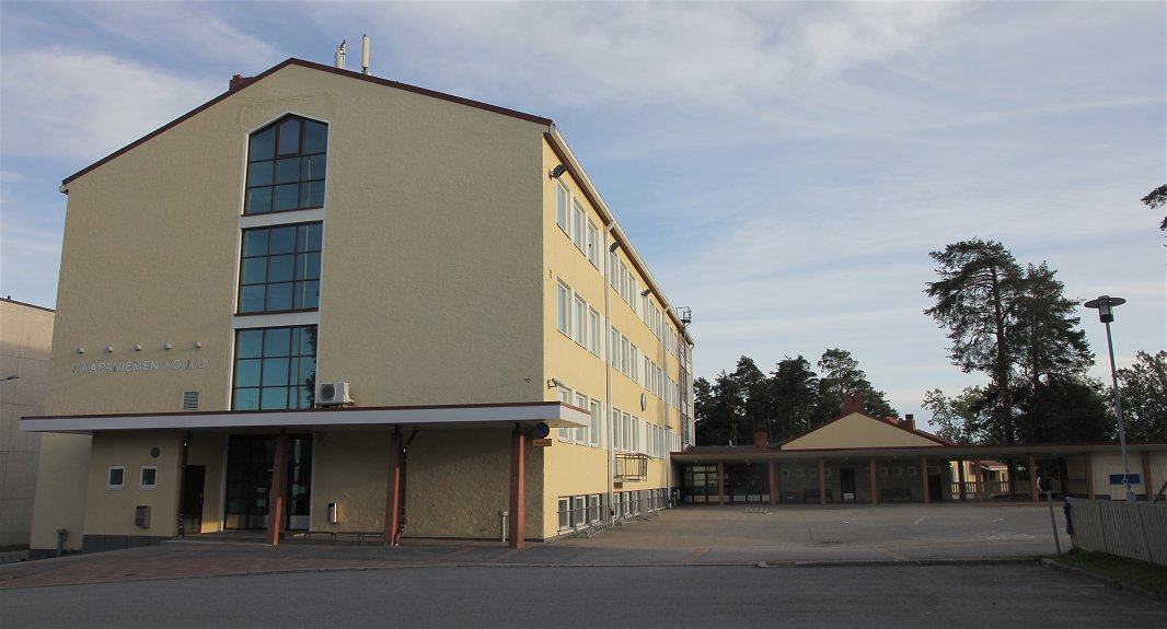 Haapaniemen koulu on Kuopion Haapaniemen kaupunginosan Mölymäellä, lähellä Kuopion keskuskenttää toimiva suomenkielinen alakoulu (luokka-asteet 1–6).